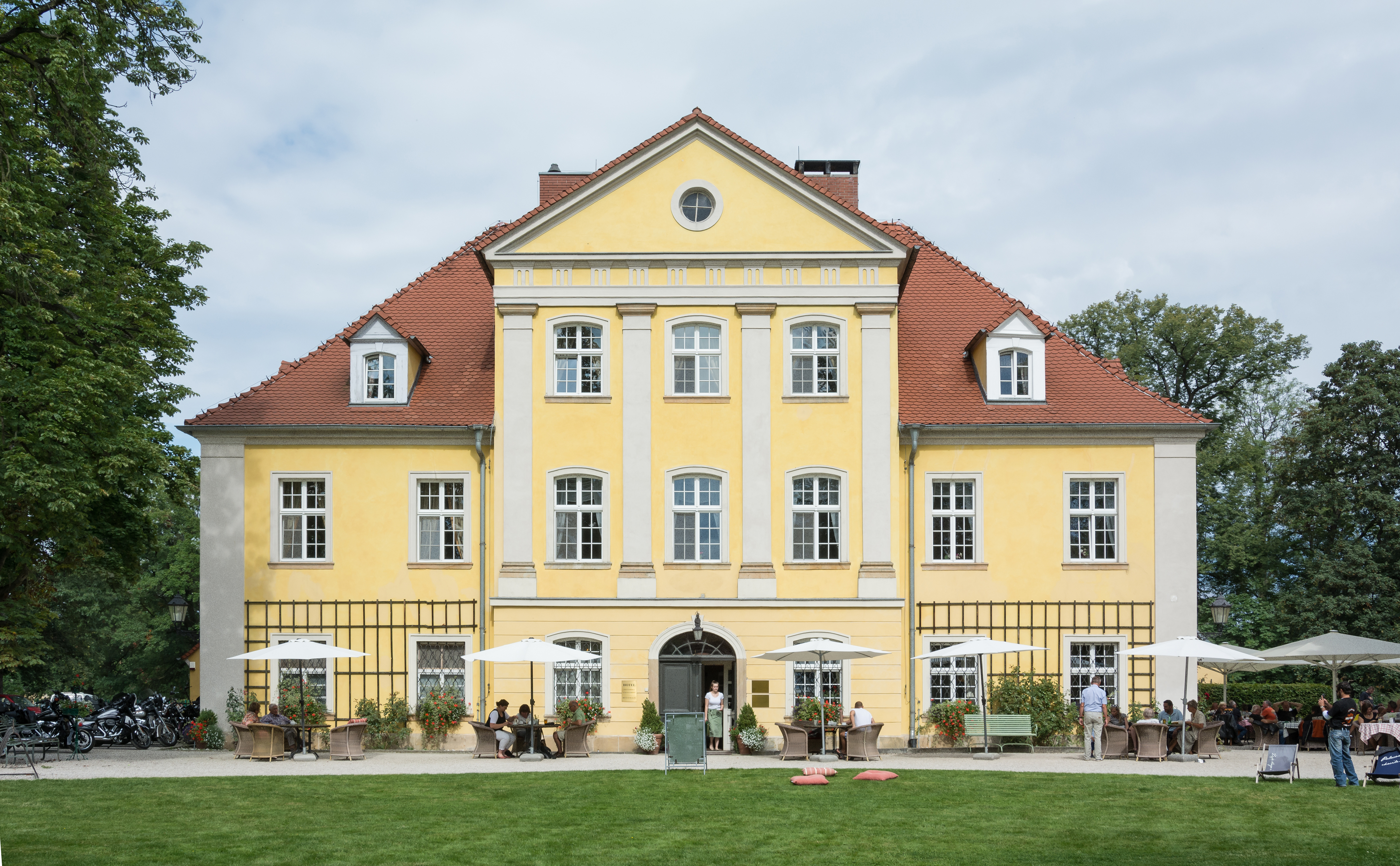 Łomnica, pałac, 1729, 1838